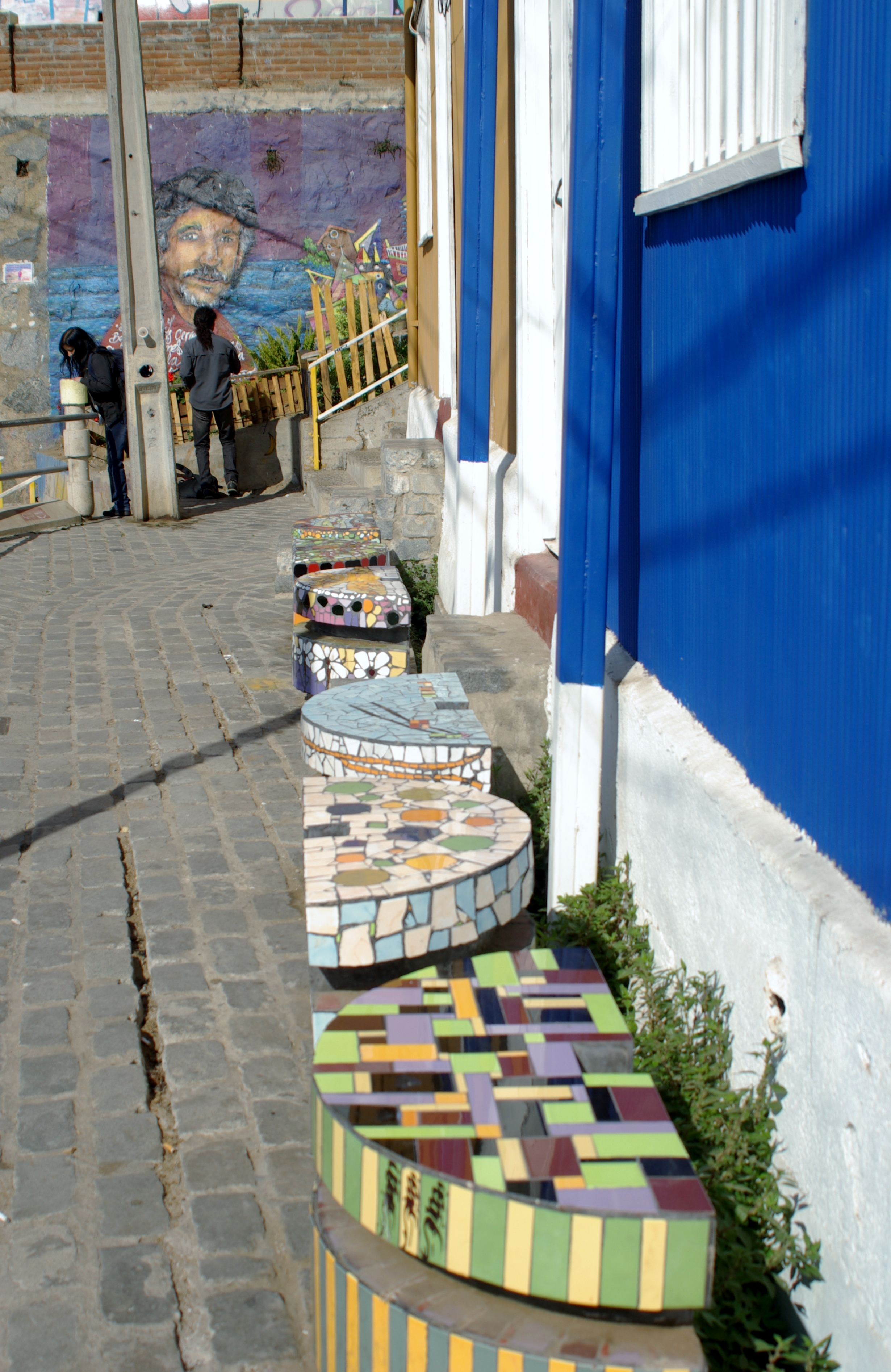 El pasaje Guimera en el cerro Bellavista; forma parte del recorrido del Museo a Cielo Abierto de Valparaíso